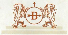 Bofors klassiska logotyp med 2 lejon